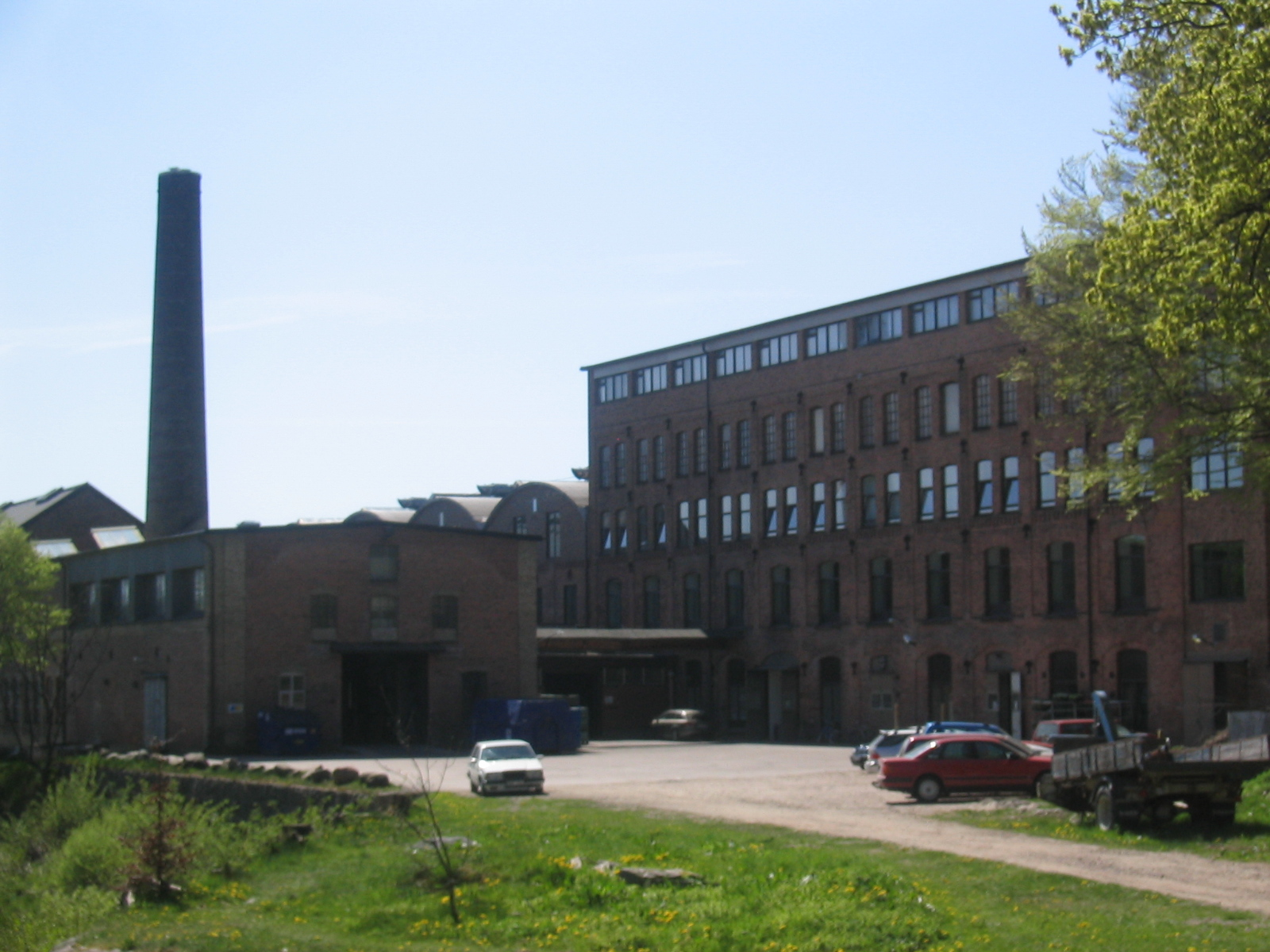 Wallbergs fabriksbyggnad, Halmstad